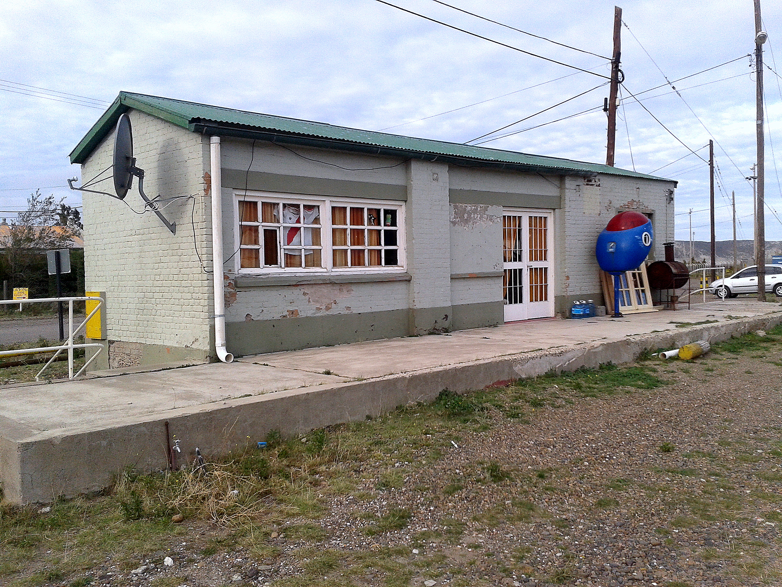 Ex estación de Astra hoy vuelta una vivienda familiar . Nótese que aún conserva su andén y un teléfono público de fines de los 70, época de su cierre